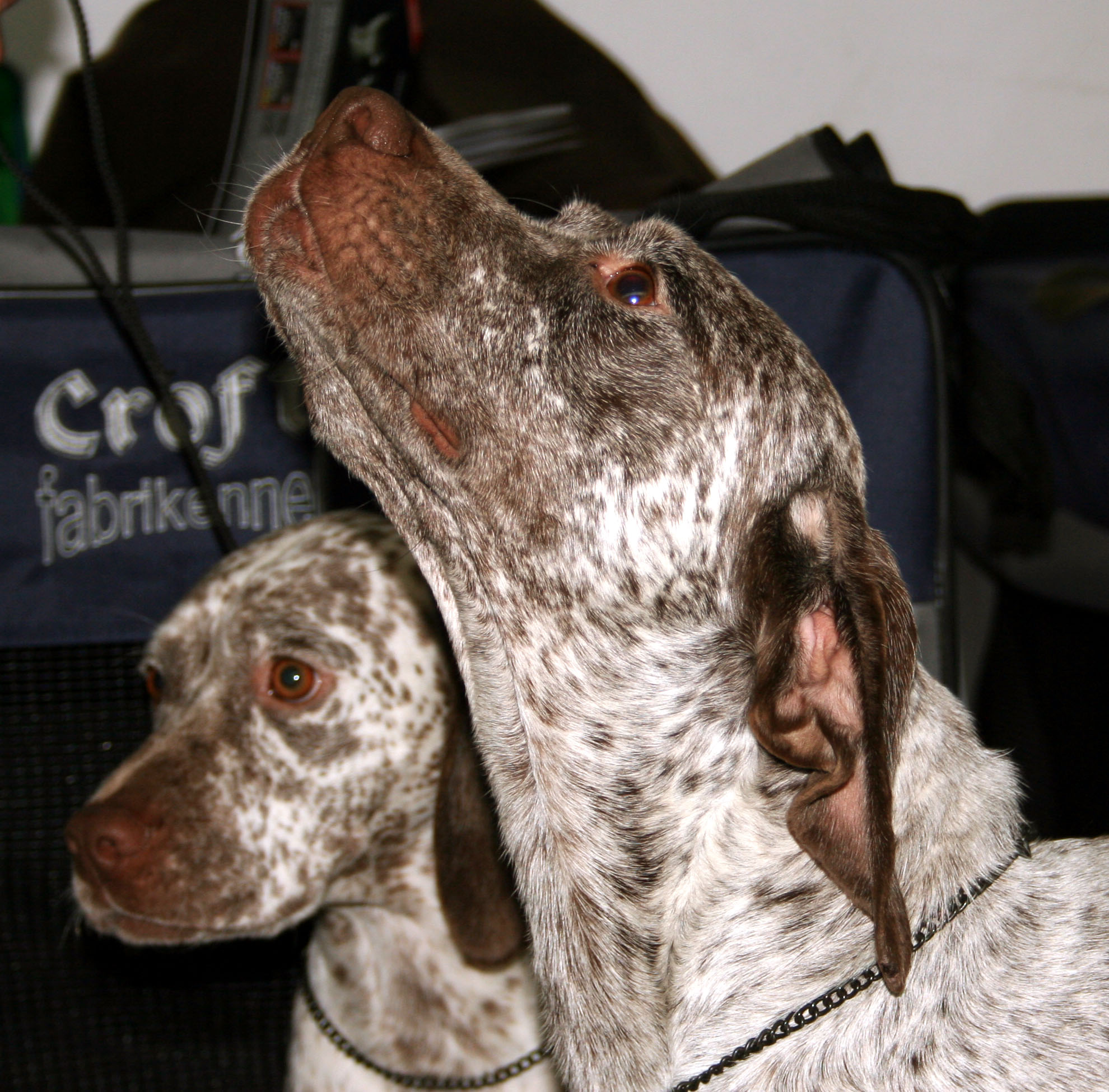 Braque_du_bourbonnais na Światowej Wystawie Psów Rasowych w Poznaniu